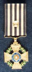 Medalha valor militar grau prata